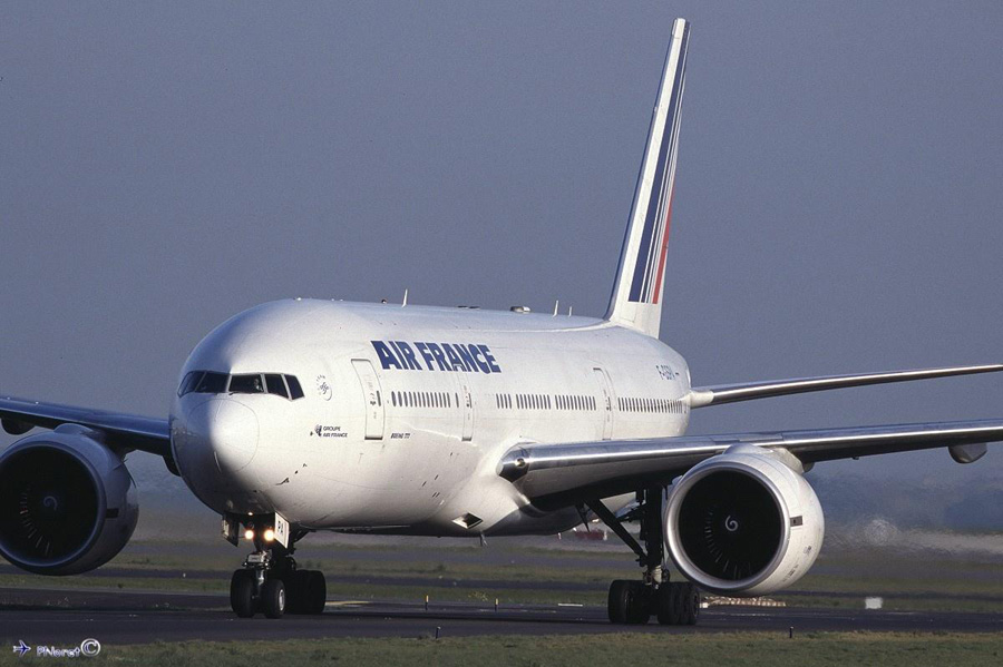 Air France Boeing 777 F-GSPA